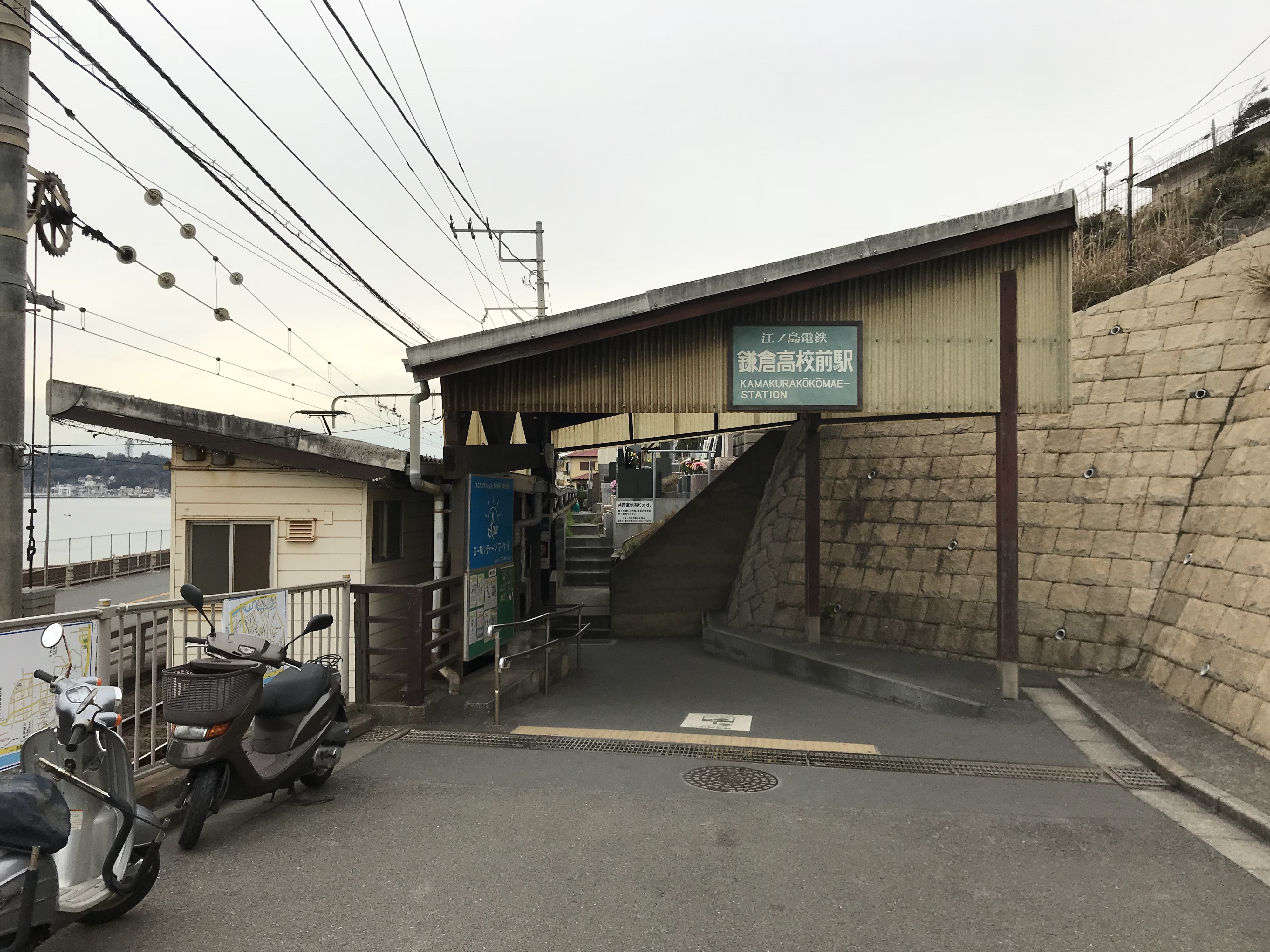 江ノ島電鉄鎌倉高校前駅駅舎